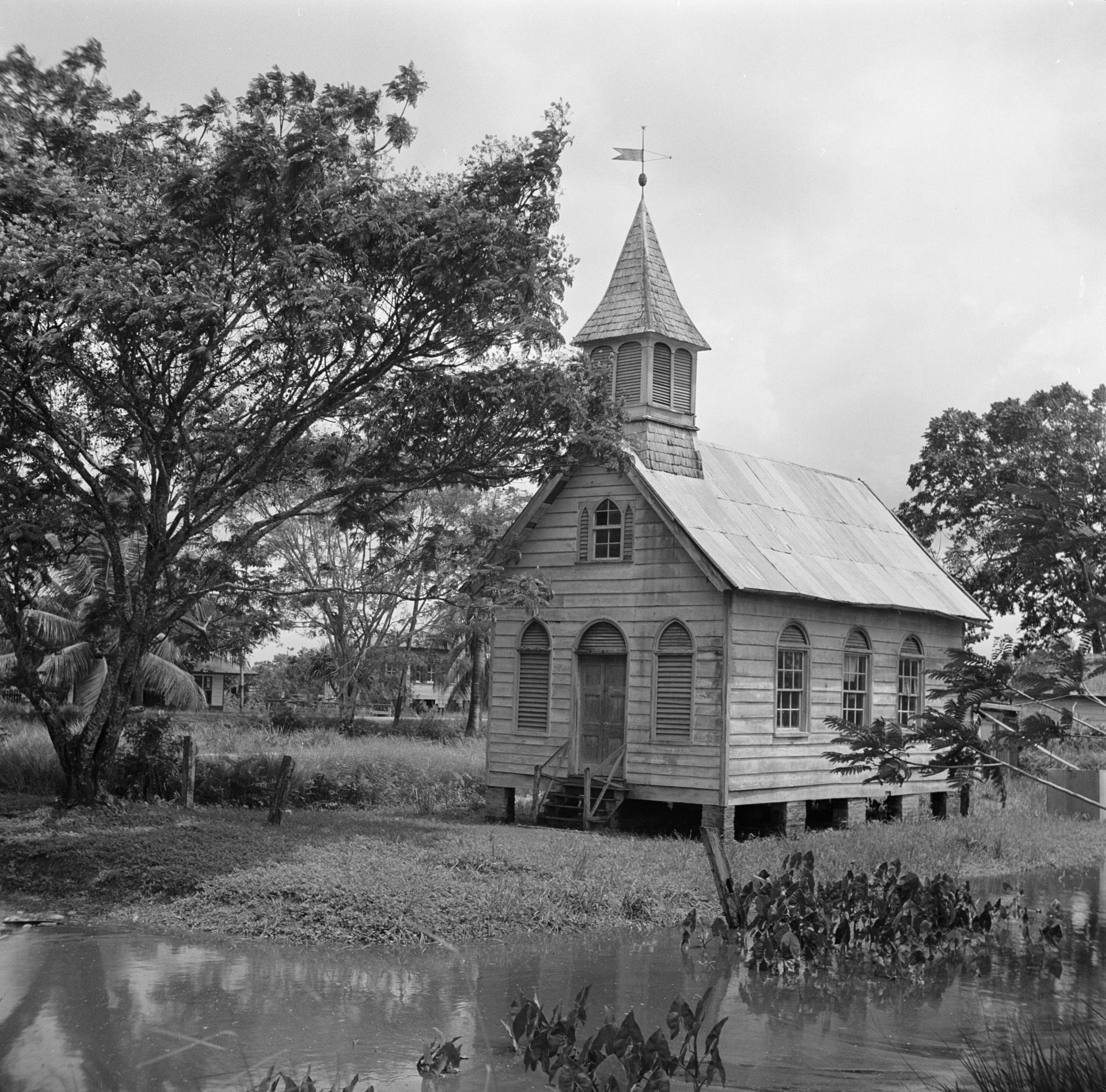 Collectie / Archief : Fotocollectie Van de Poll Reportage / Serie : Reis naar Suriname en de Nederlandse Antillen Beschrijving : Een kerk in de Nickeriepolder Datum : 1947 Locatie : Nickerie, Suriname Trefwoorden : dorpsbeelden, religie Persoonsnaam : paradise Fotograaf : Poll, Willem van de Auteursrechthebbende : Nationaal Archief Materiaalsoort : Negatief (zwart/wit) Nummer archiefinventaris : bekijk toegang 2.24.14.02 Bestanddeelnummer : 252-5609